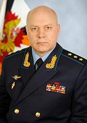 Начальник Главного управления Генерального штаба Вооруженных Сил Российской Федерации – заместитель начальника Генерального штаба Вооруженных Сил Российской Федерации генерал-полковник Коробов Игорь Валентинович